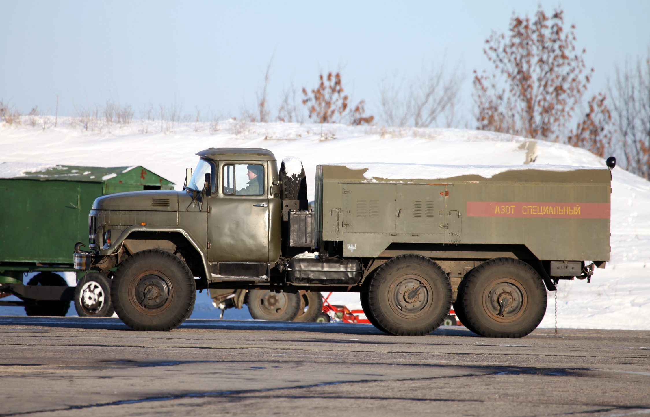 Универсальная газозарядная станция УГЗС.М-А-131 (Nitrogen vehicle UGZS.M-A-131)